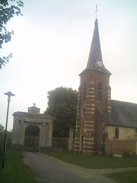 Eglise